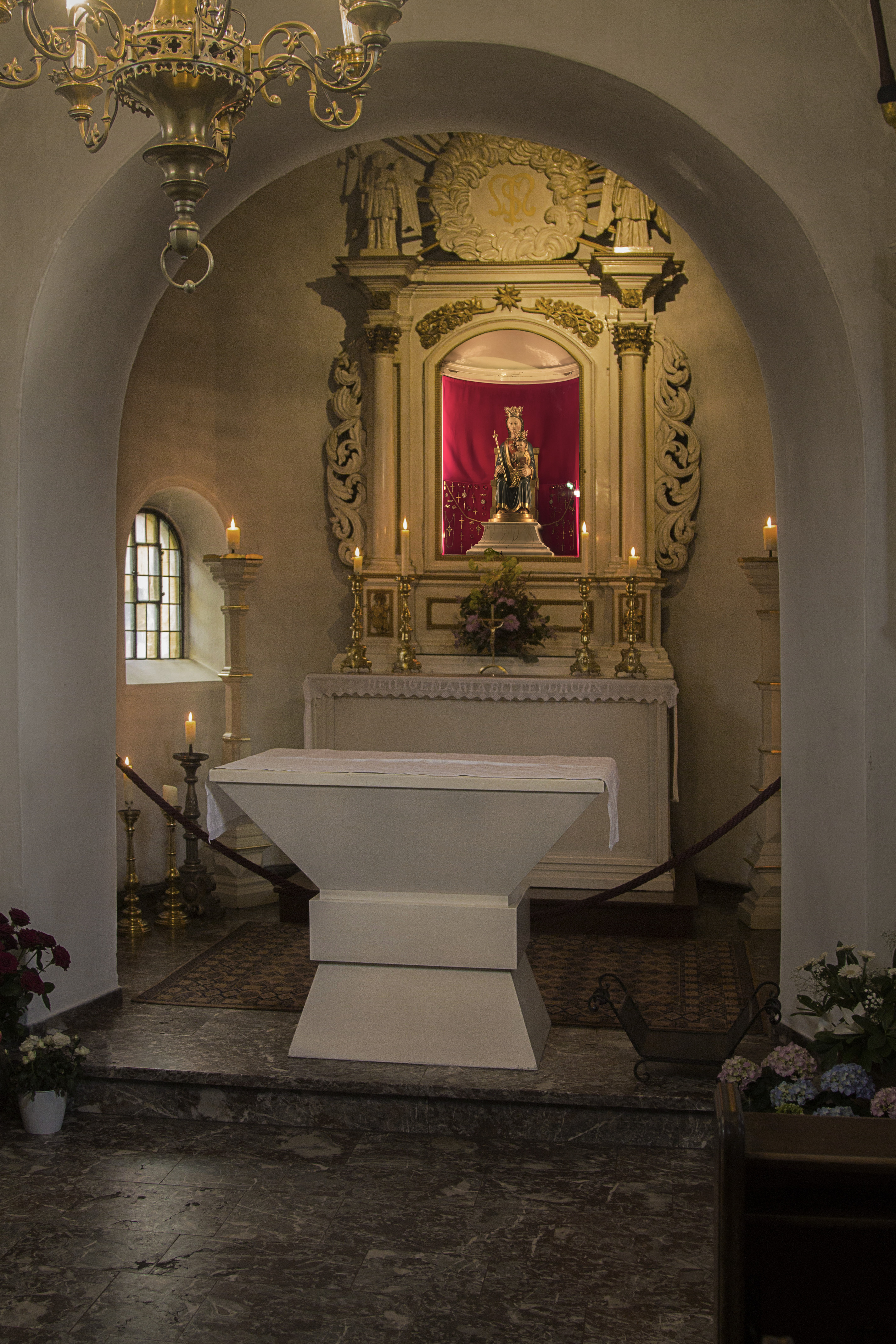 Gnadenbild Eggerode